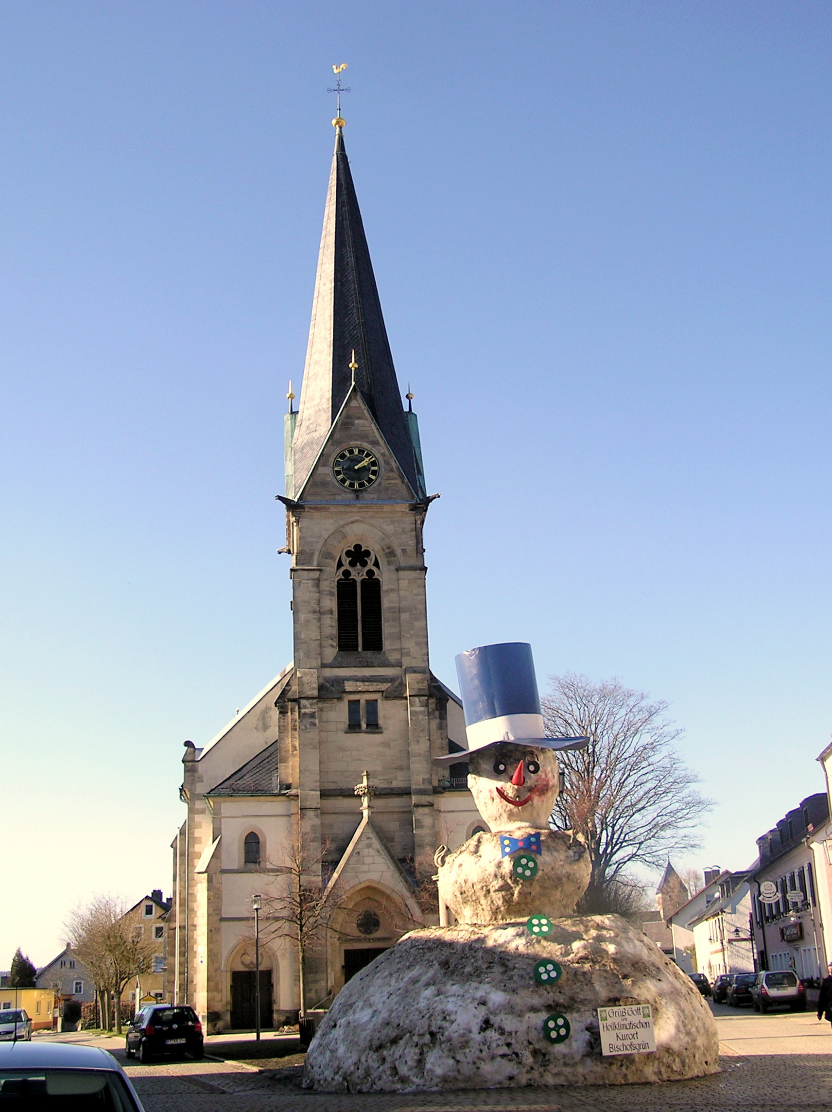 Bischofsgrün Schneemann 2007